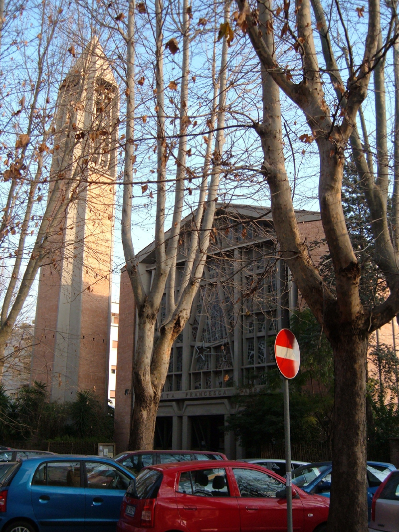 Chiesa di Santa Francesca Cabrini, a Roma, nel quartiere Nomentano.